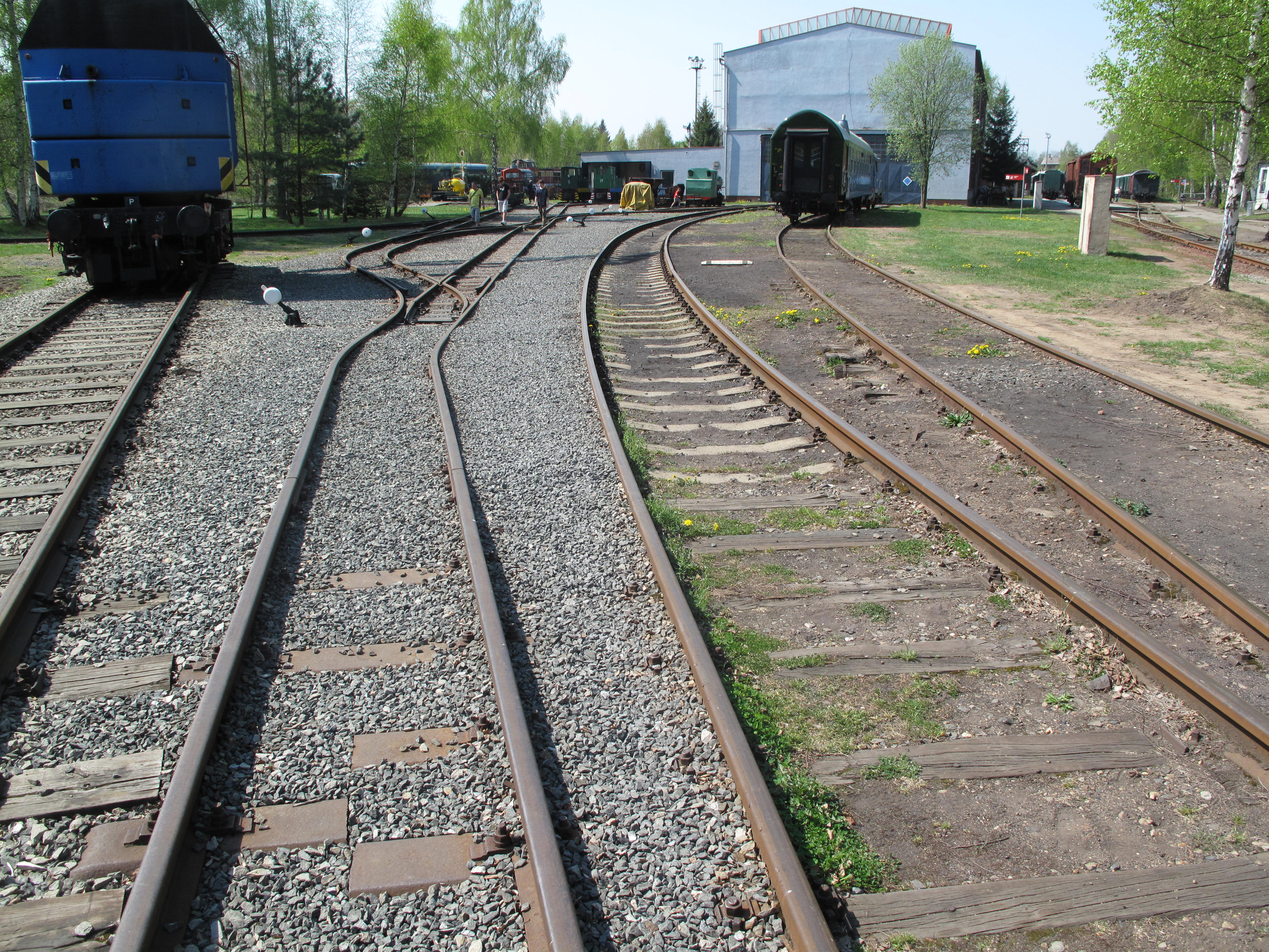 Železniční muzeum Lužná u Rakovníka